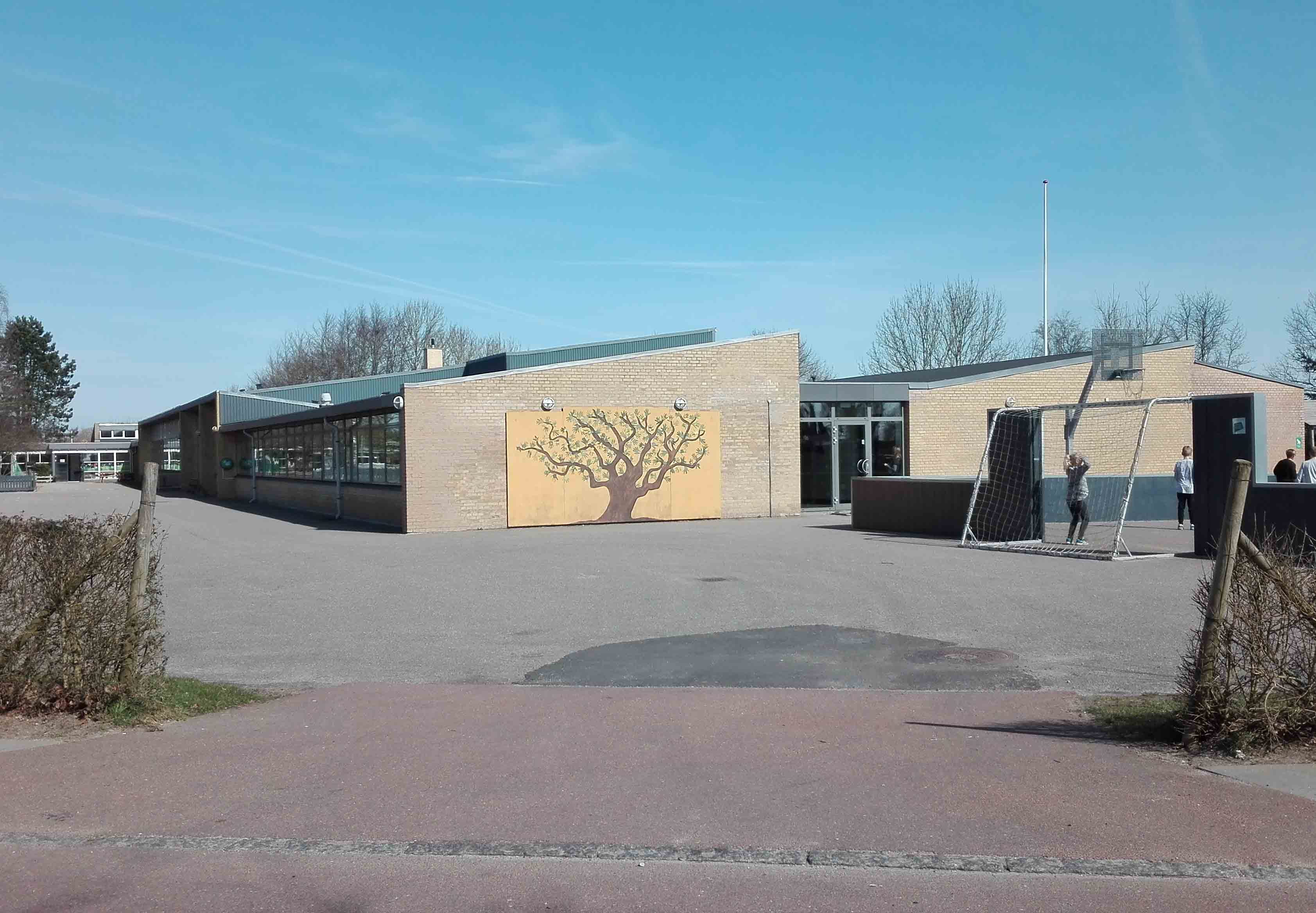 Varnæs Skole